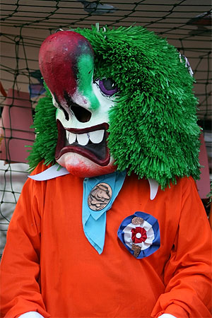 Basler Fasnacht 05: Waggis